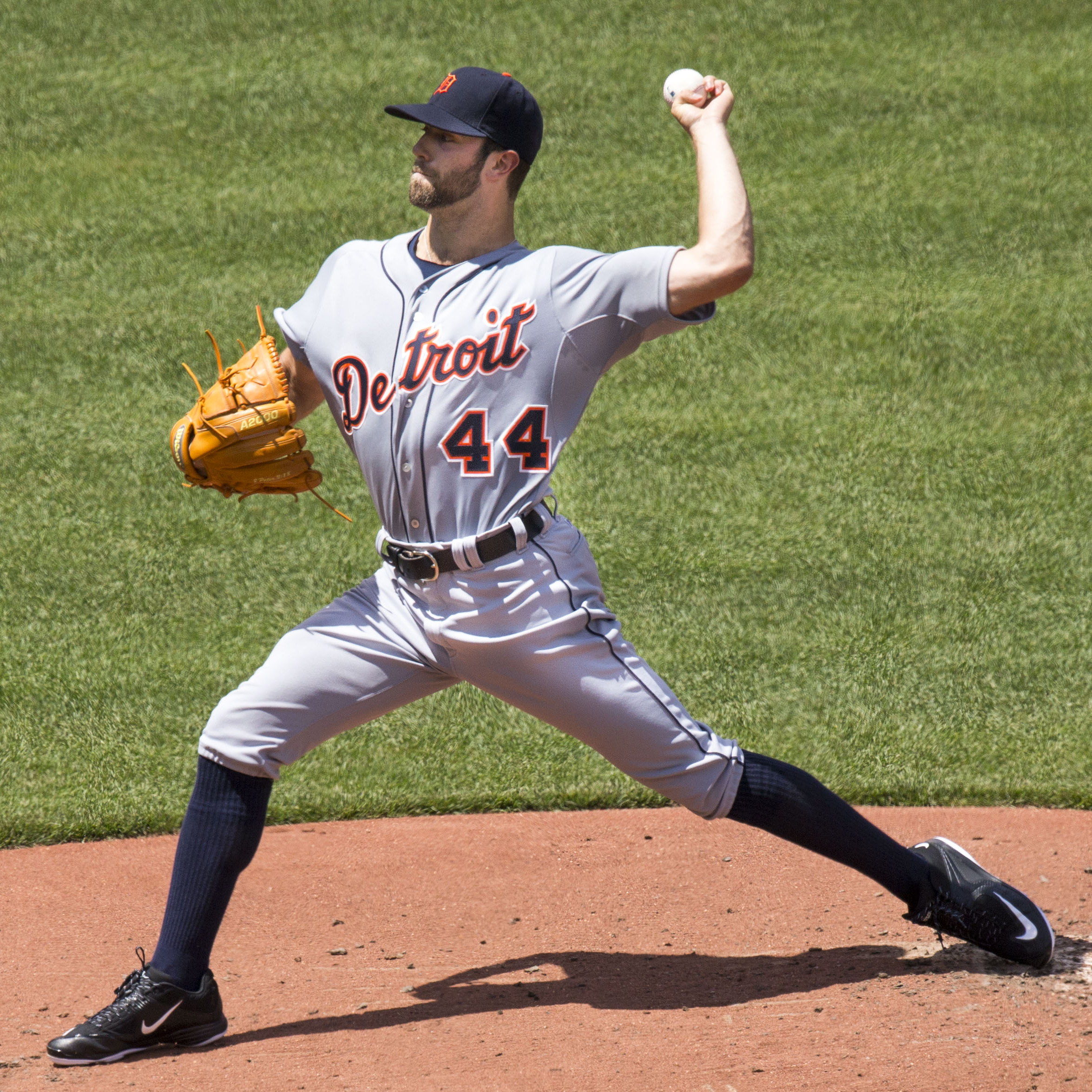 Daniel Norris